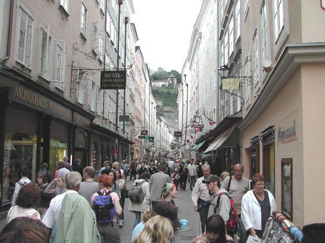 Neues Bild der Getreidegasse in Salzburg, aufgenommen im August 2005. (Original text: Getreidegasse, Salzburg)